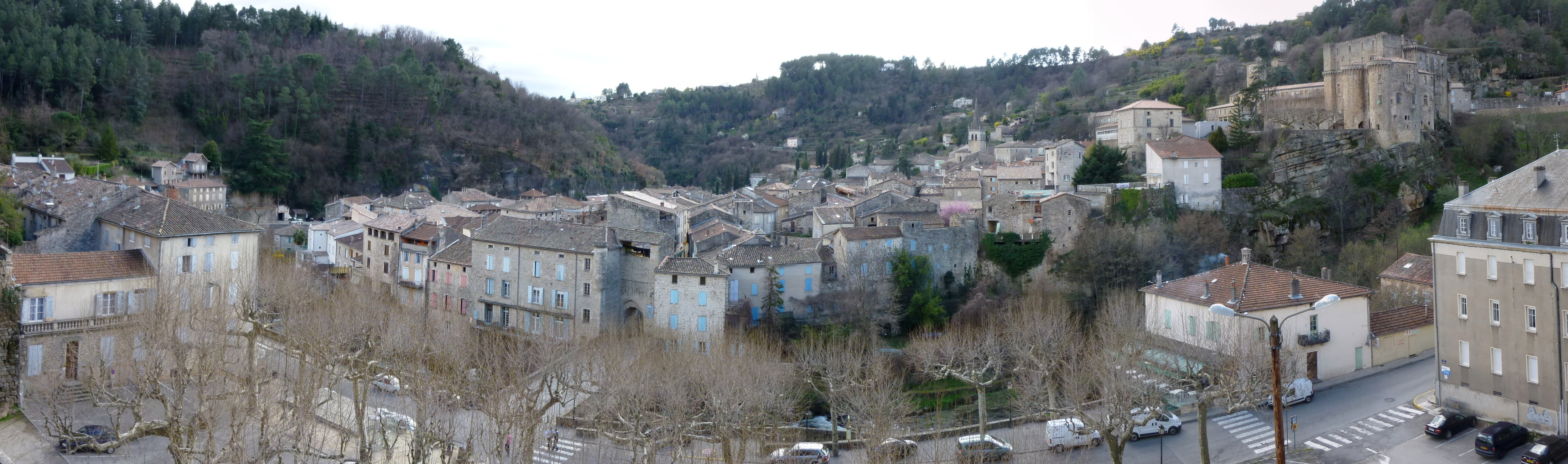 Panoramique de Largentière depuis une terrasse au-dessus du tribunal. Entrée de la ville. Rivière ligne. Toits. Château. Ardèche, 07, France